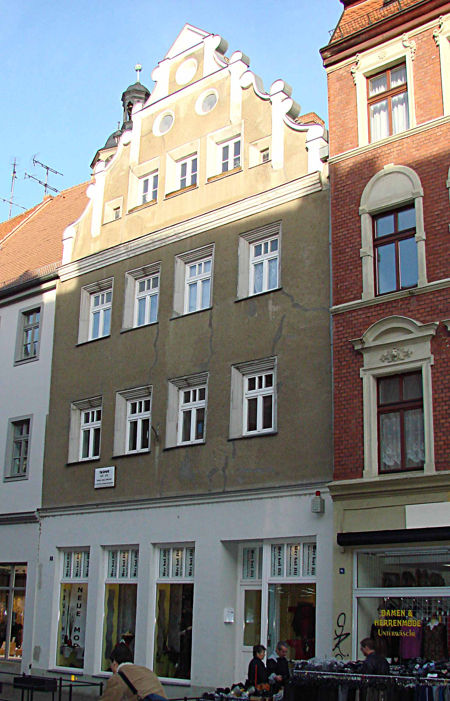 Haus in dem Paul Gerhardt in Wittenberg wohnte